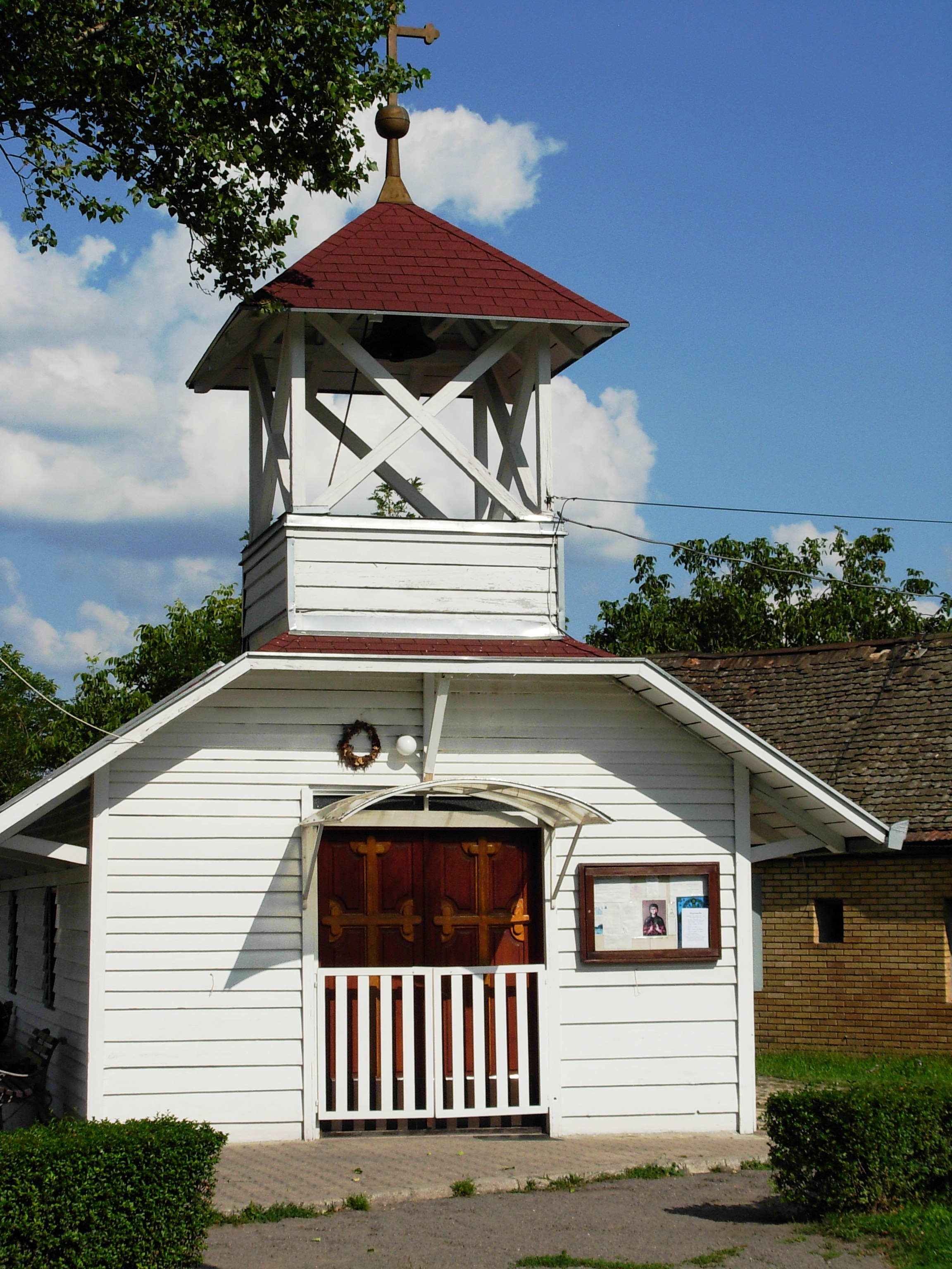 Crkva Svete Petke u Petrovaradinu, avgust 2011.